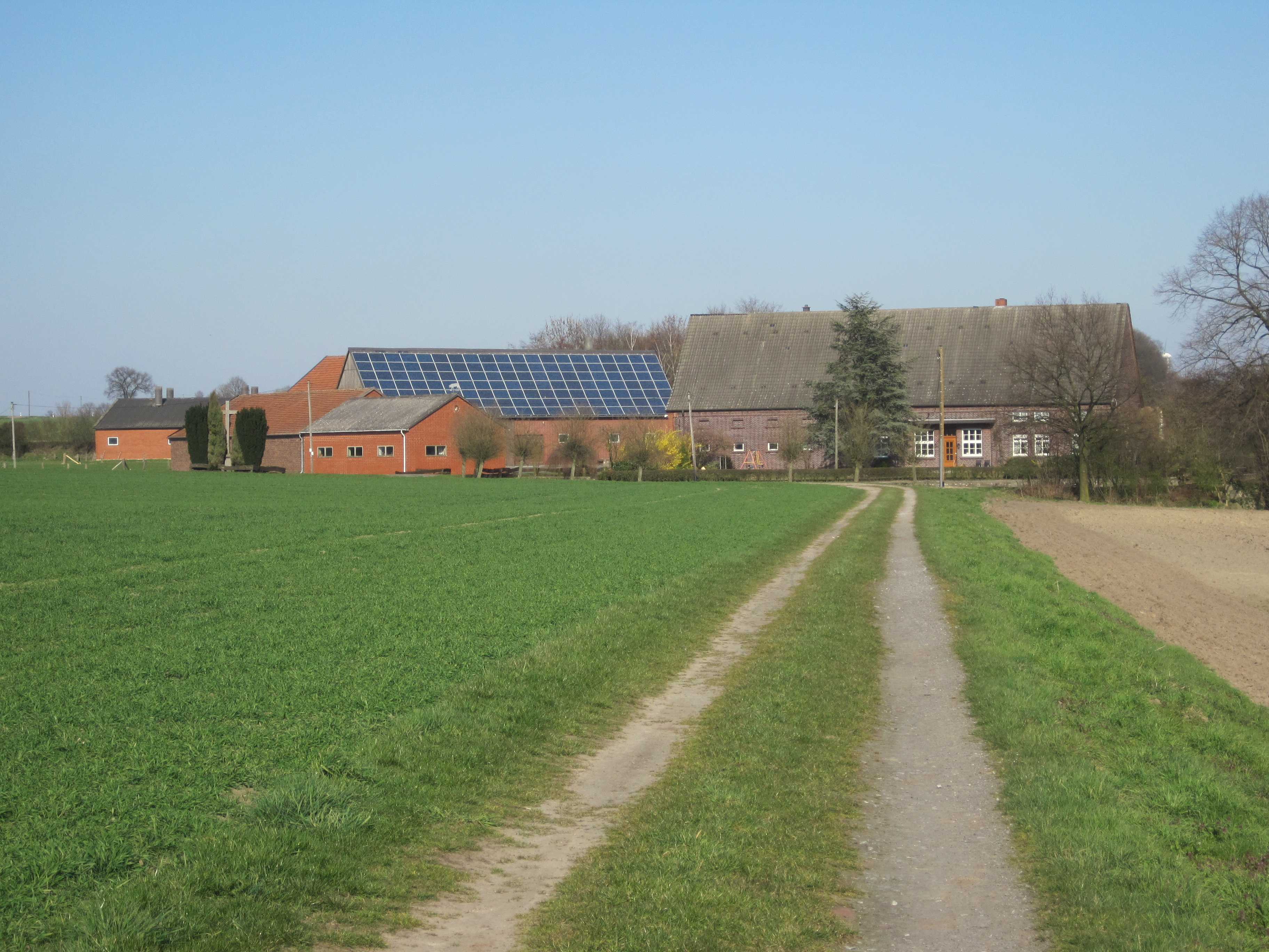 Das Foto zeigt die Umbegung von Haus Hardenberg in Werne-Nordick.